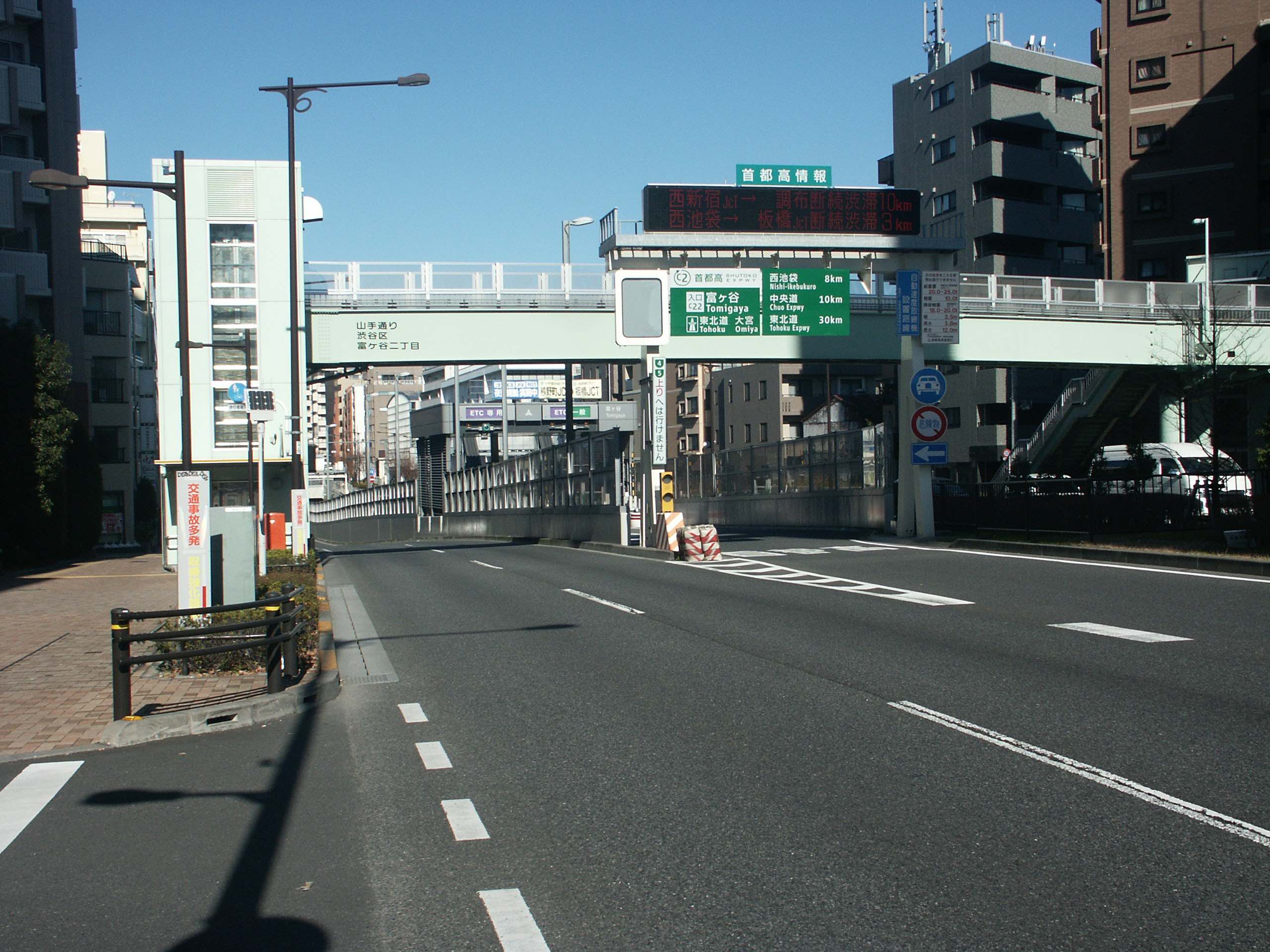 首都高速道路中央環状線富ヶ谷入口付近